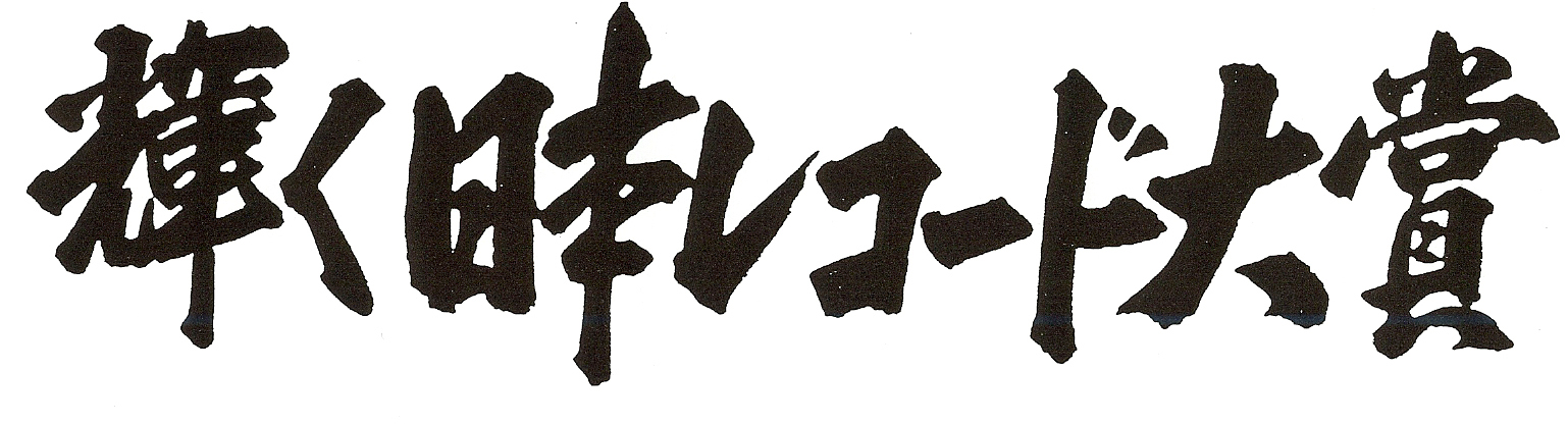 Logotip del Japan Record Awards o Nihon Rekôdo Taishô